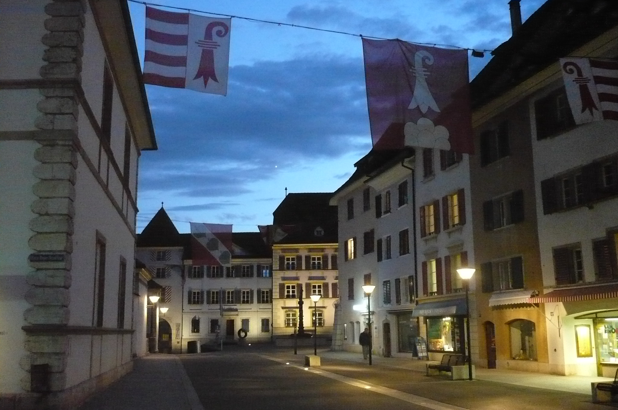 Delémont; Rue du 23 Juin